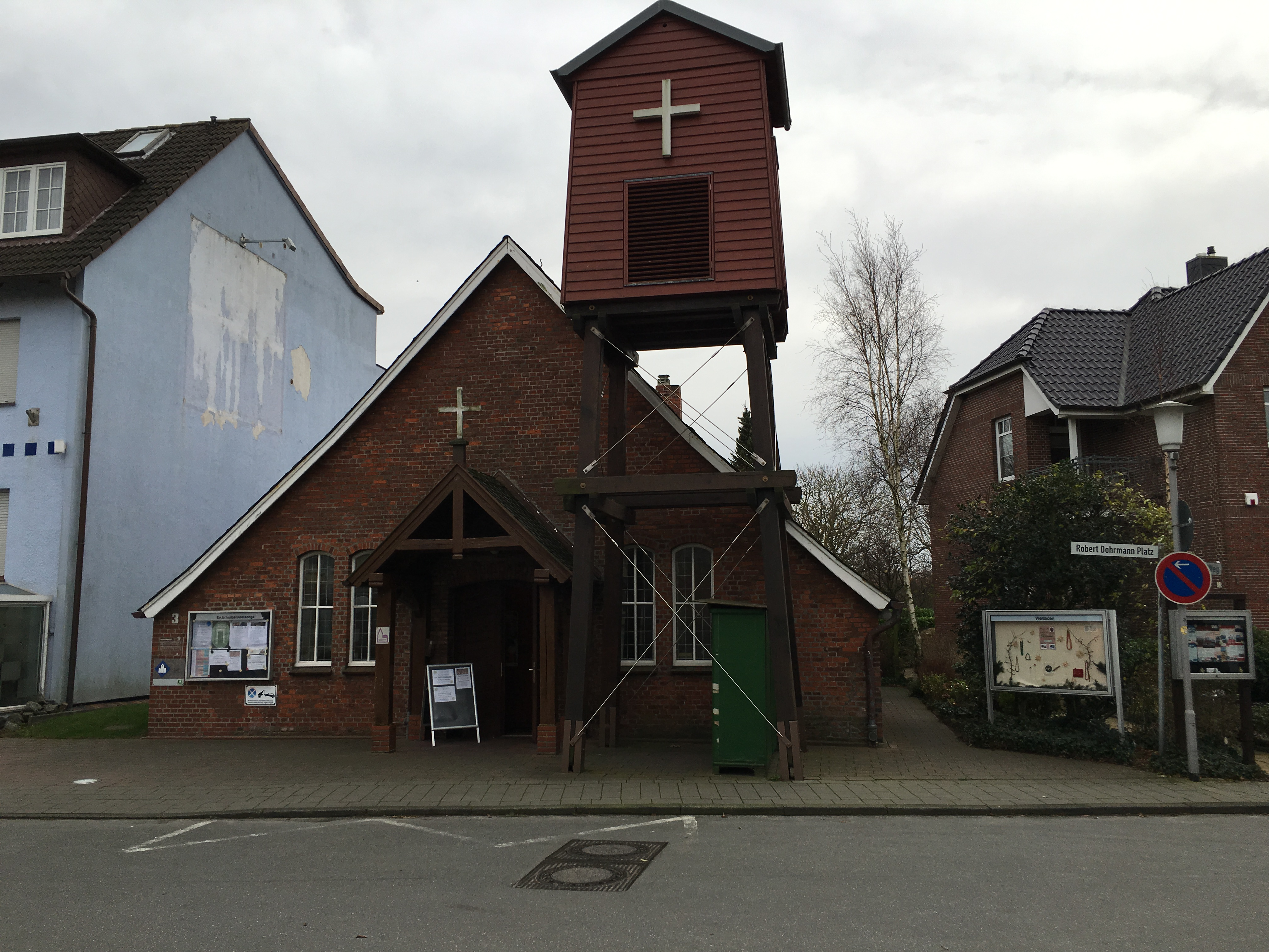 Kapell an’n Robert-Dohrmann-Platz in Duhnen (Cuxhoben)